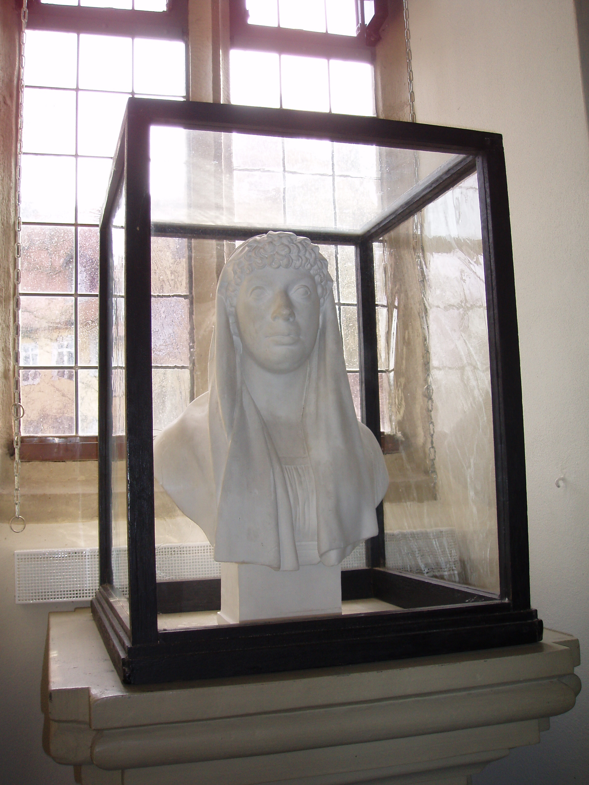 Büste der Franziska von Hohenheim in der Sindlinger Kirche